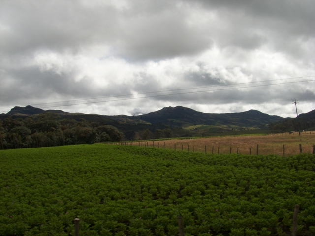 Cultivos de la zona